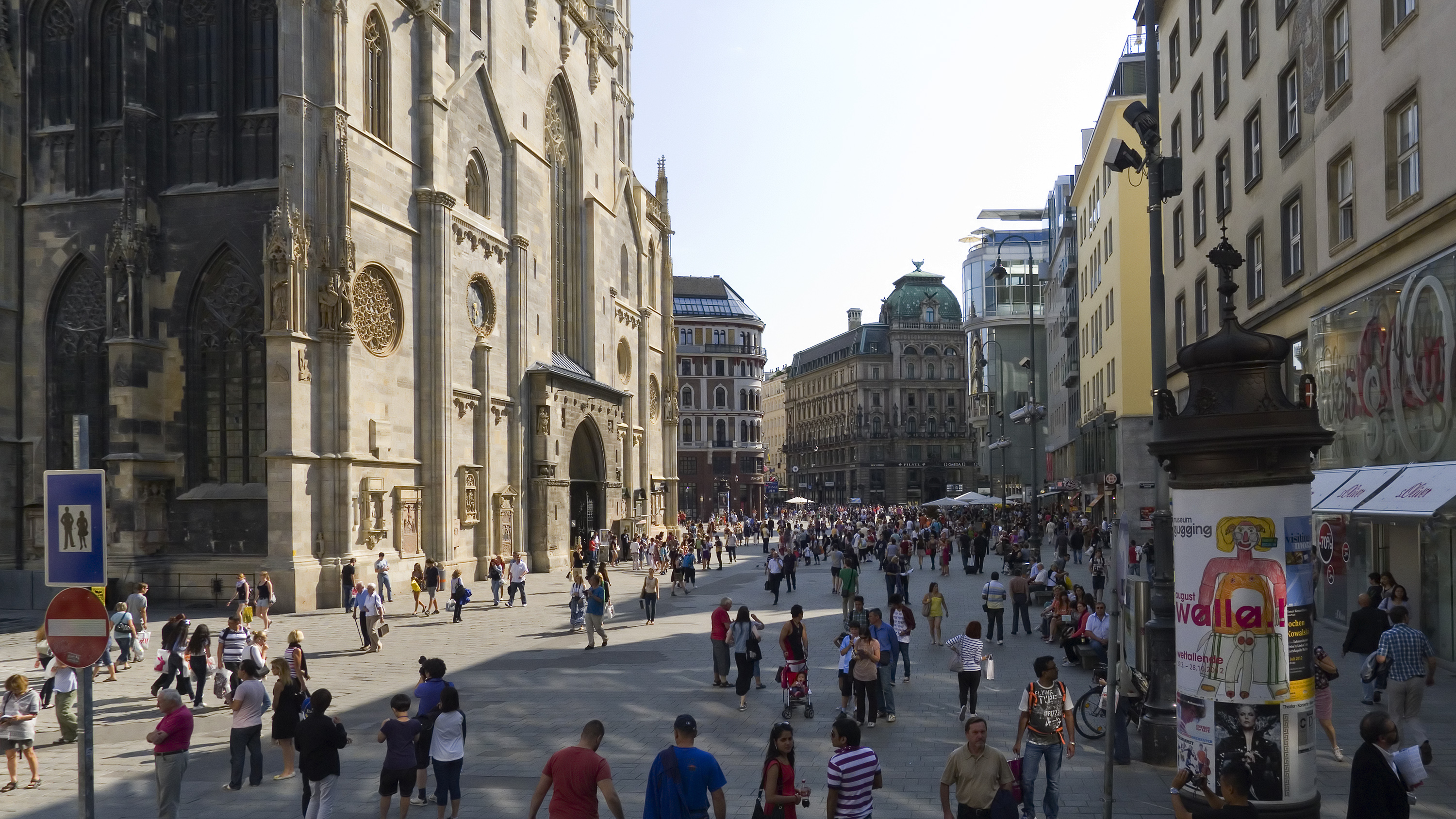 Stephansplatz in Wien 1 bei der Rotenturmstraße Richtung Südwesten